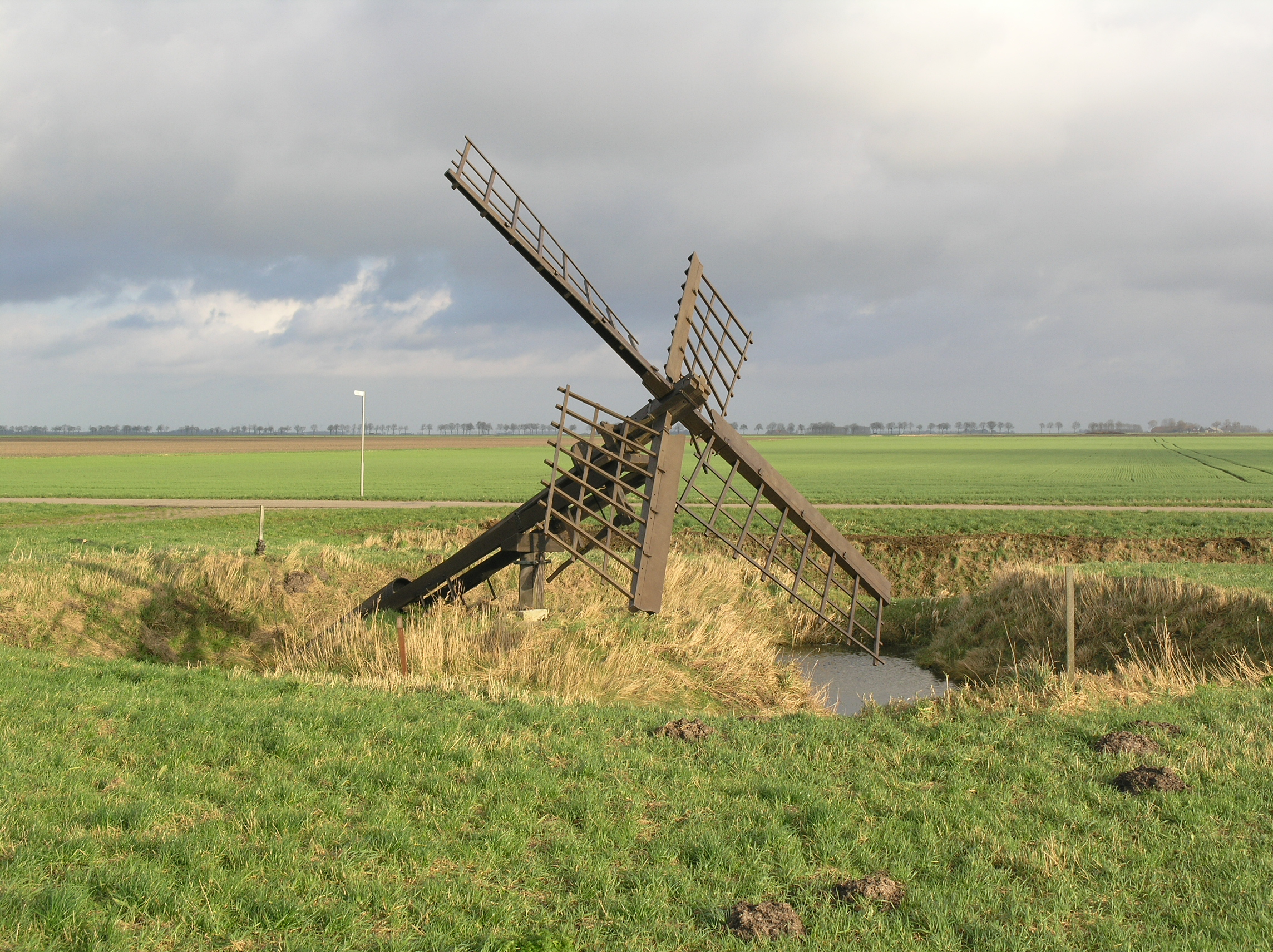 Nieuw Scheemda Tjasker